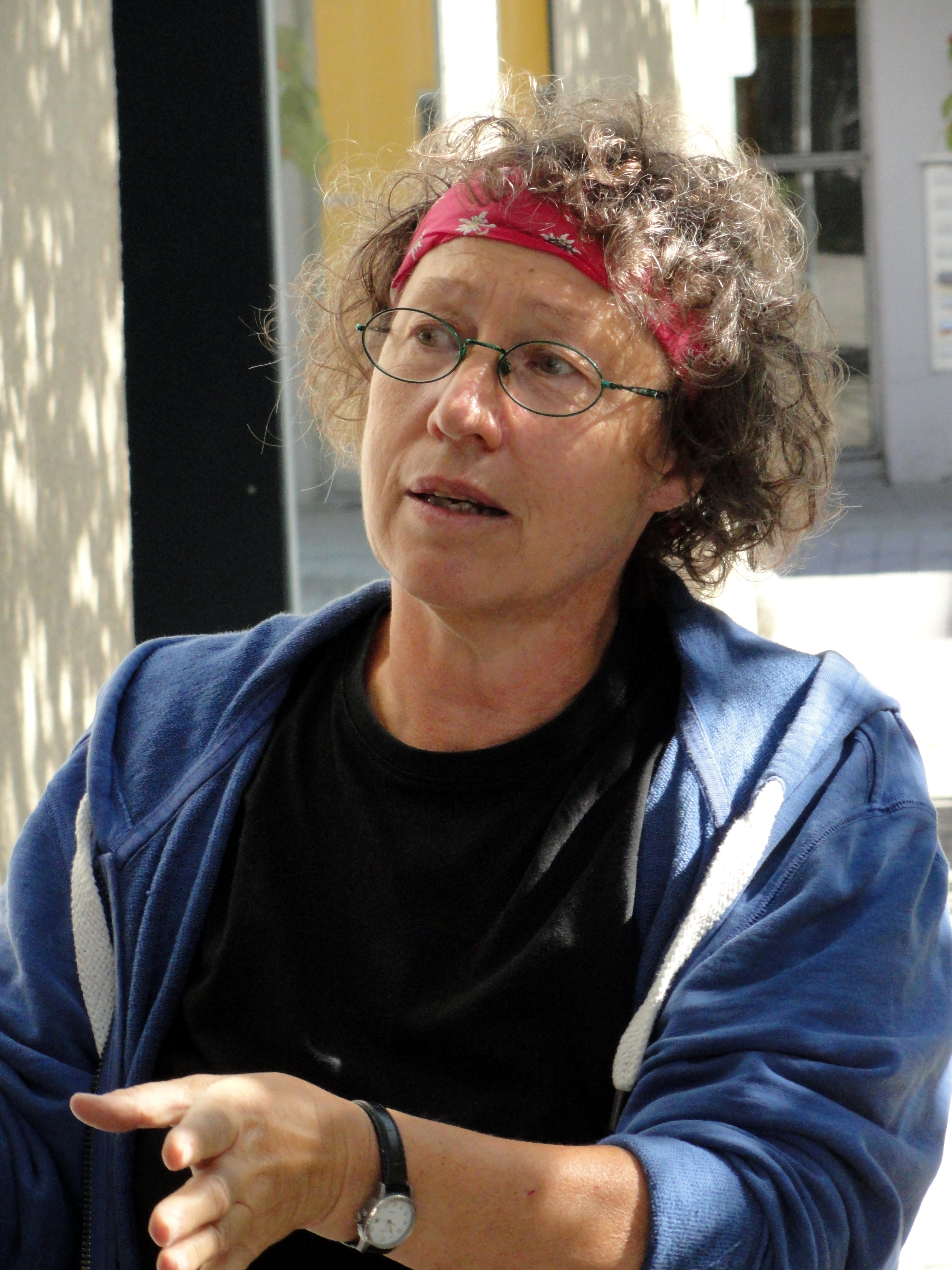 Bernadette Mayr bei einer Führung durch das Beginenhaus-Ensemble.